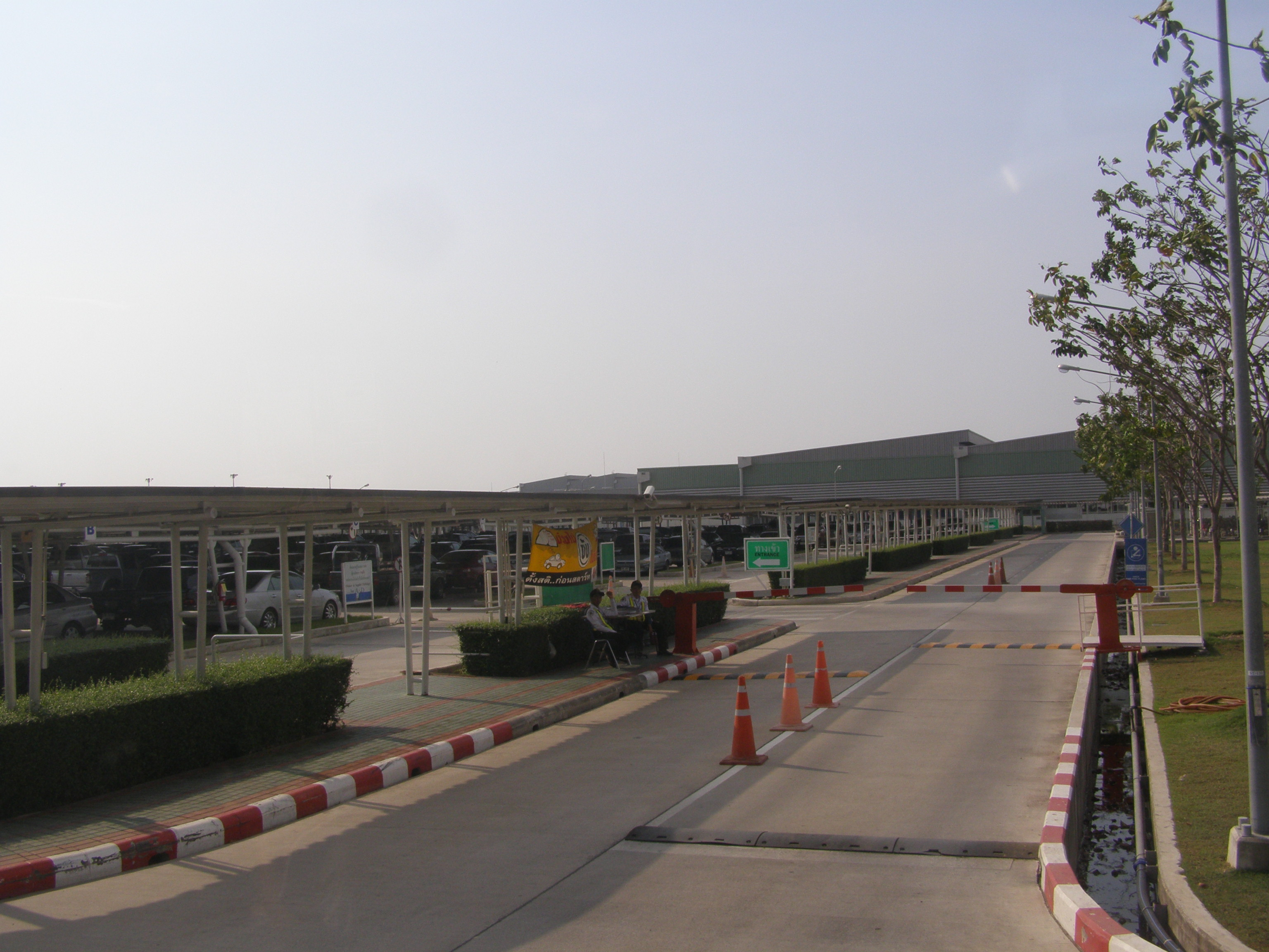 TOYOTA BAN PHO PLANT